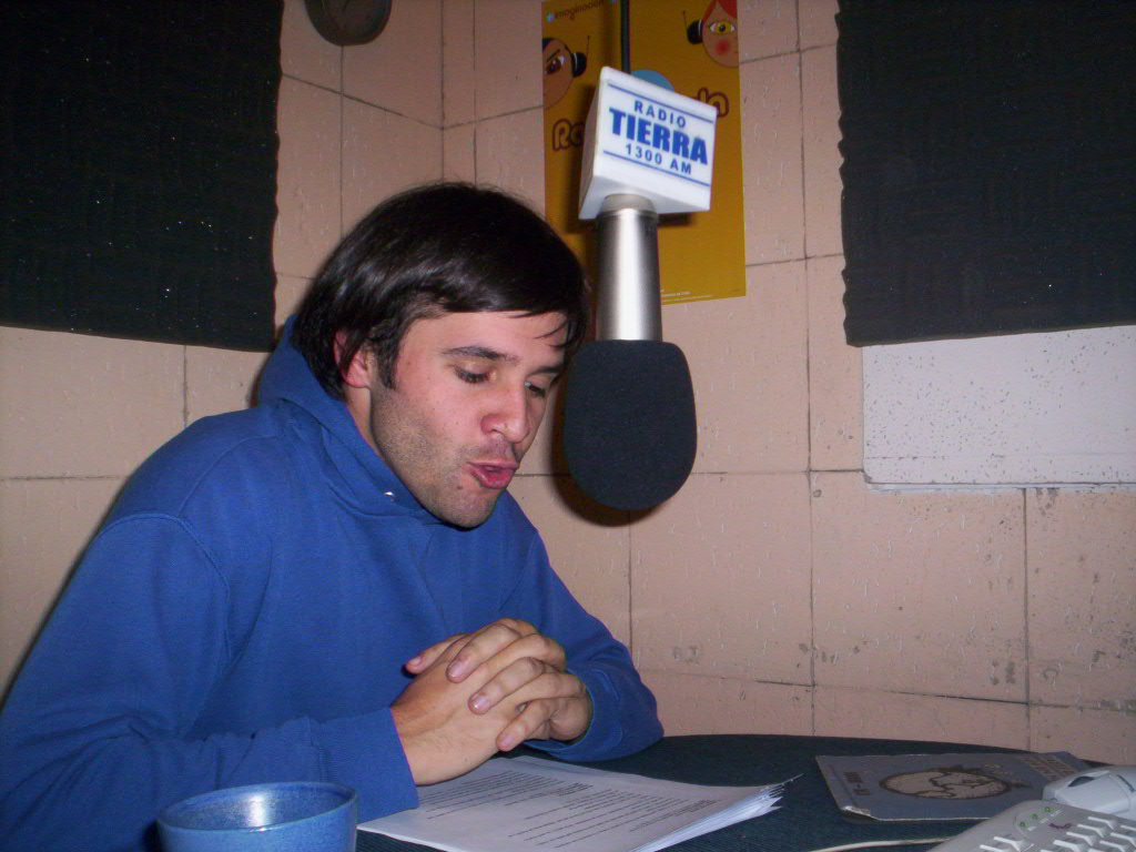 Radio amigo Mario Horton